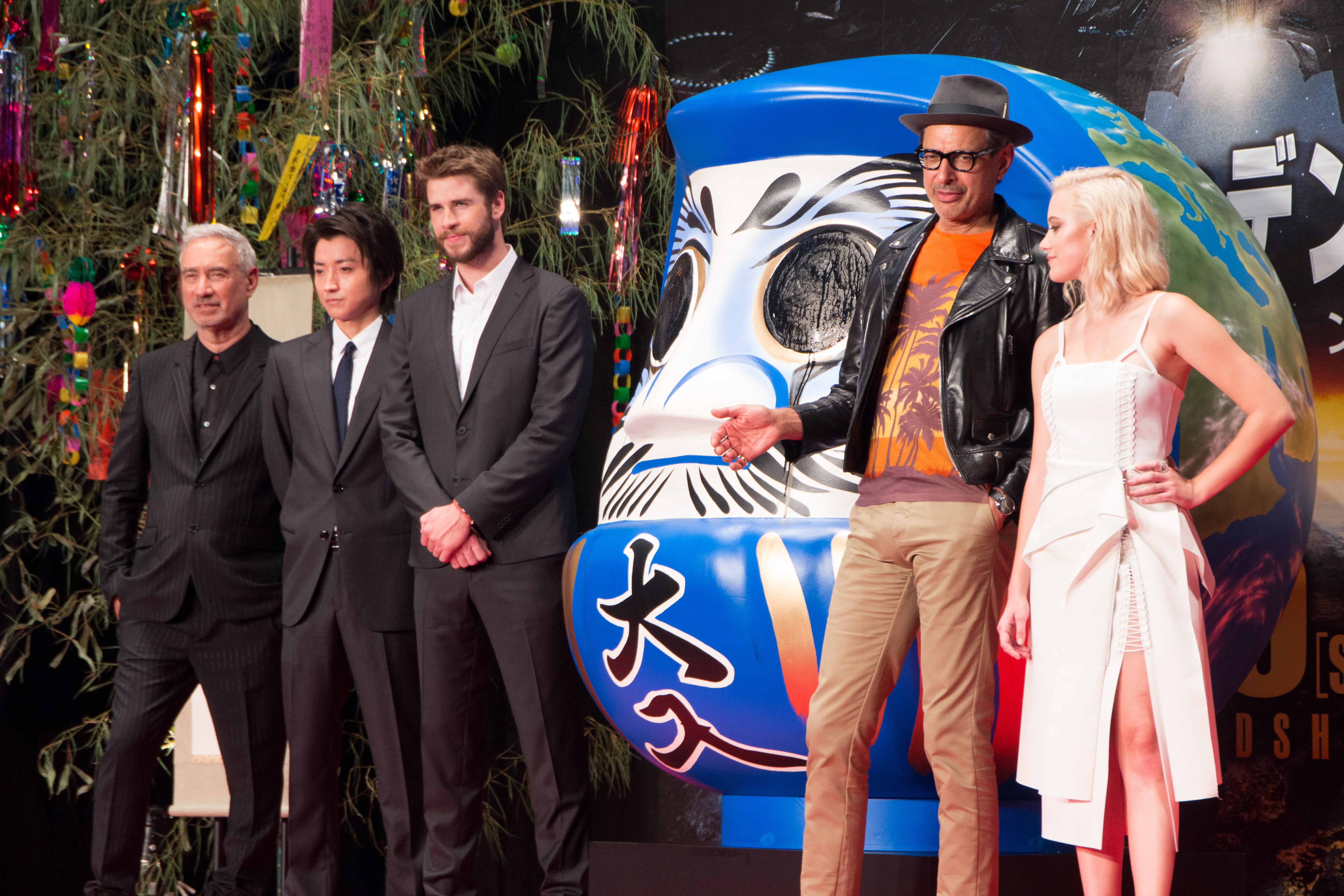 インデペンデンス・デイ: リサージェンス ジャパンプレミア ローランド・エメリッヒ 藤原竜也 リアム・ヘムズワース ジェフ・ゴールドブラム マイカ・モンロー